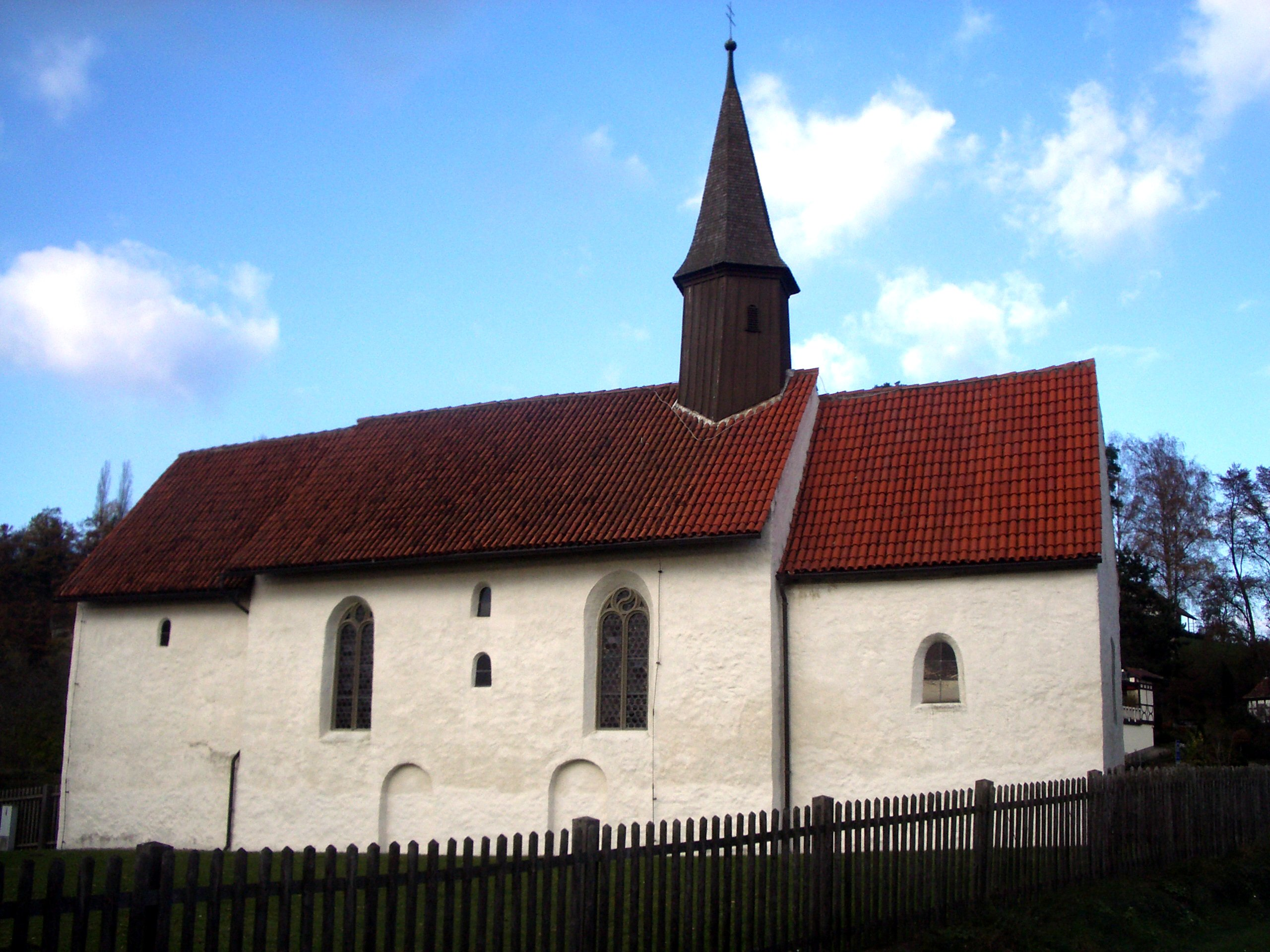 Überlingen, Germany: Kapelle St. Sylvester in Goldbach